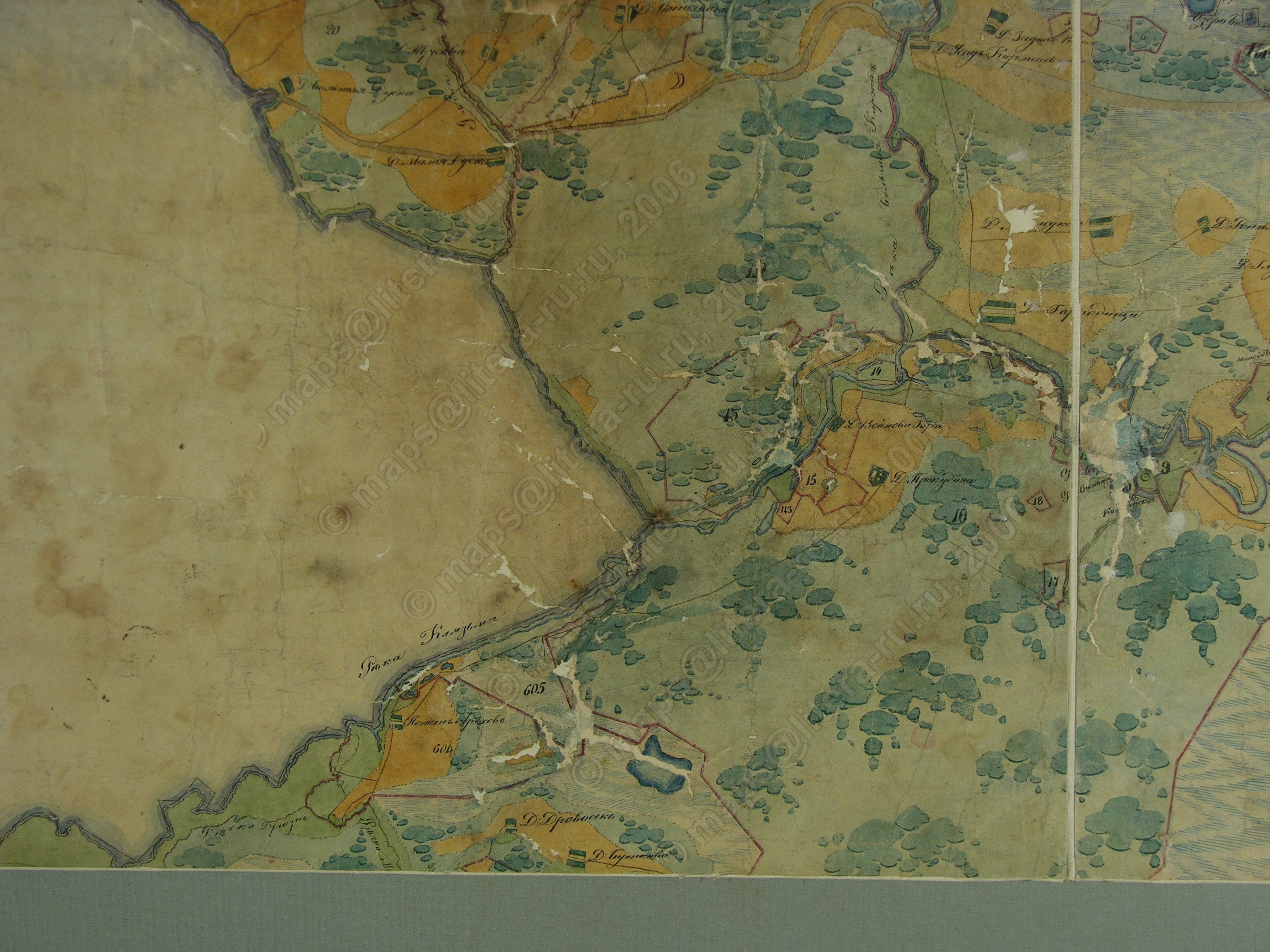 Карта Покровского уезда (ПГМ 1 верста) 1780 - 1790 гг